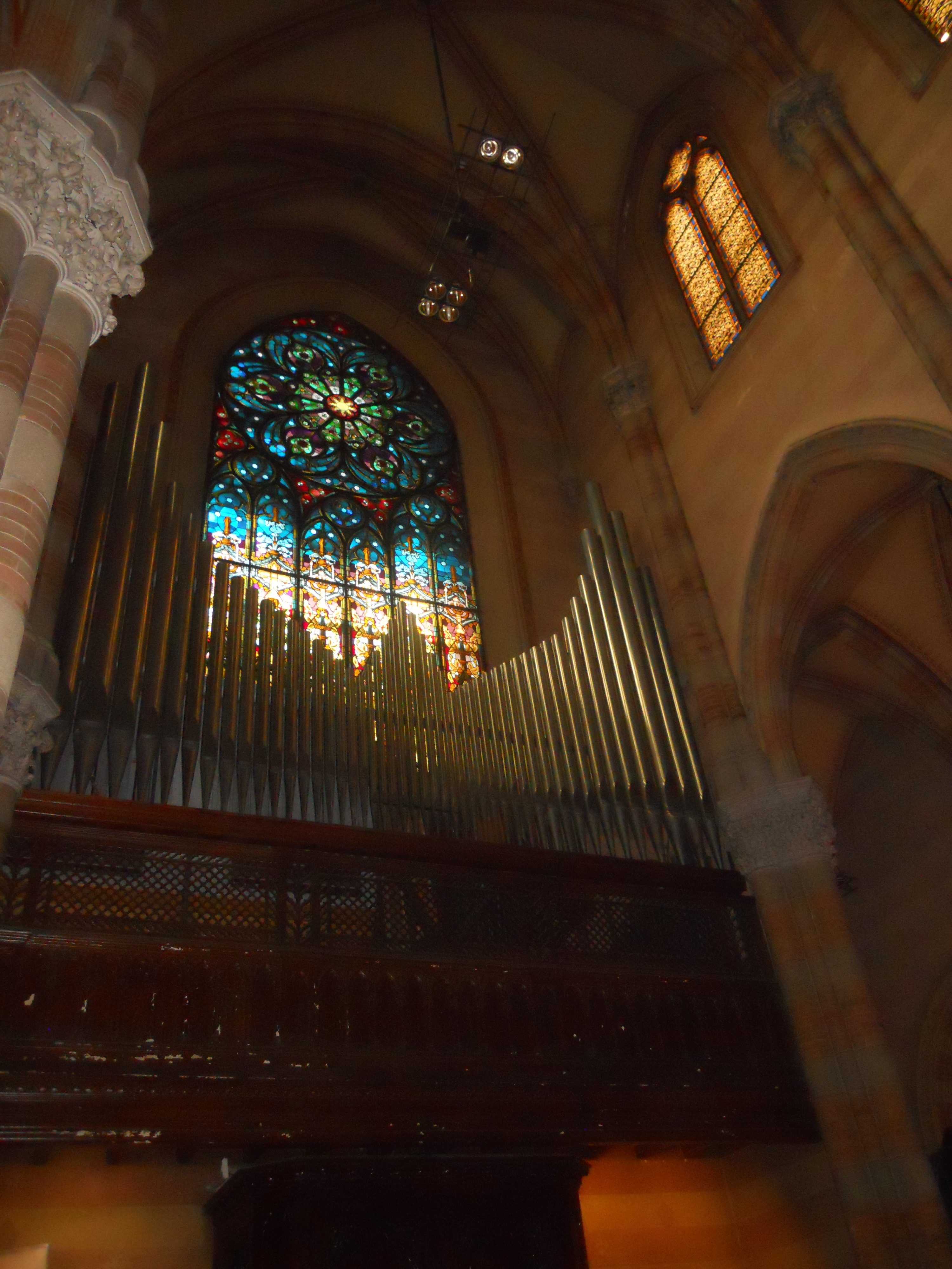 La controfacciata della chiesa del Sacro Cuore di Gesù in Prati a Roma con l'organo Ruffatti.